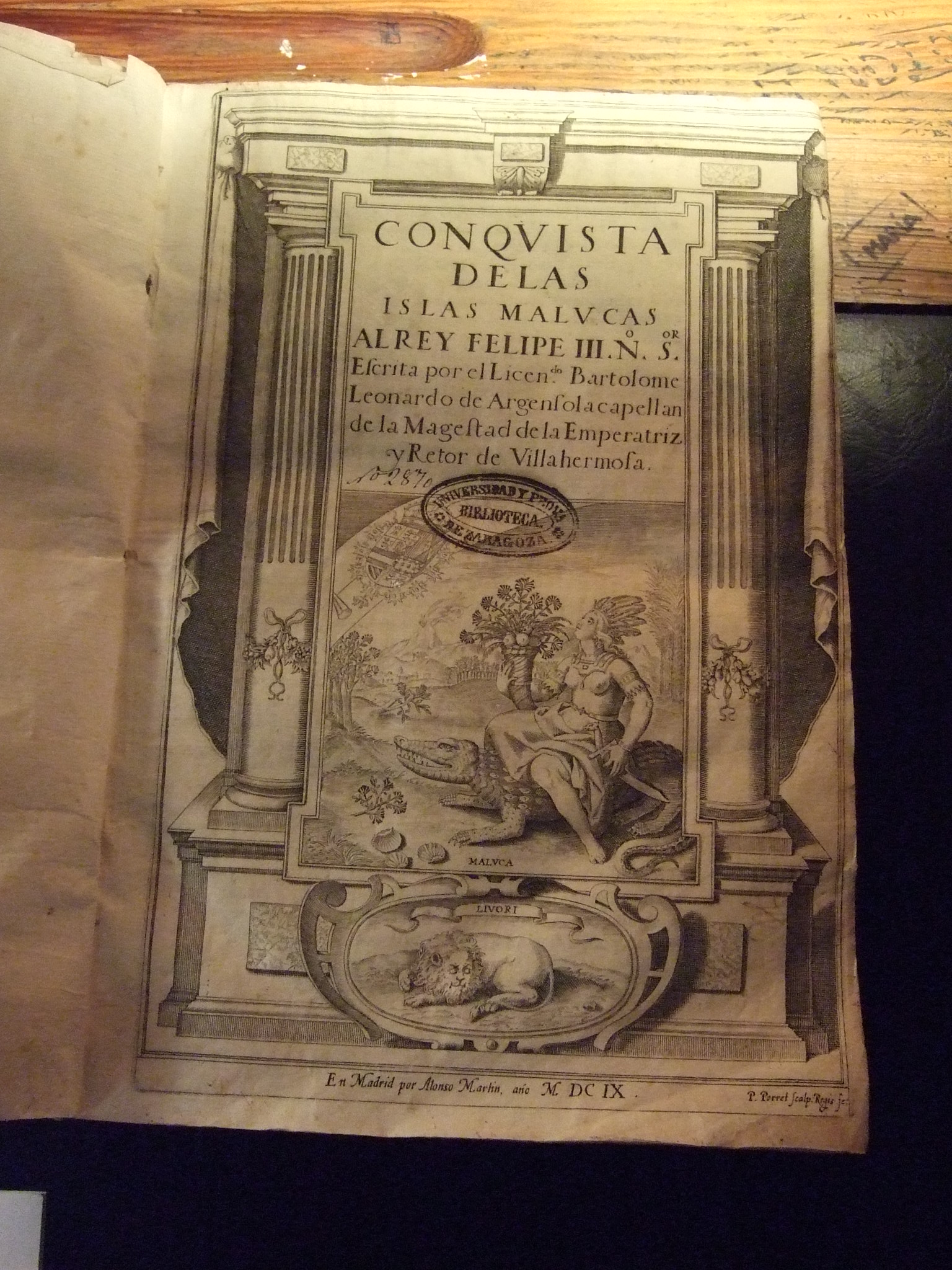 Leonardo de Argensola, Bartolomé (1562-1631) Conquista de las Islas Malucas ... texto completo En Madrid : por Alonso Martin, 1609